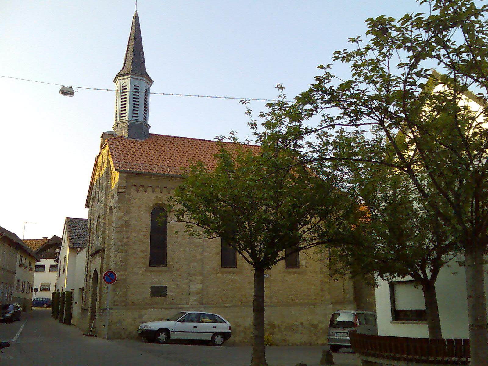 Kath. Kirche in Bubenheim Rheinhessen